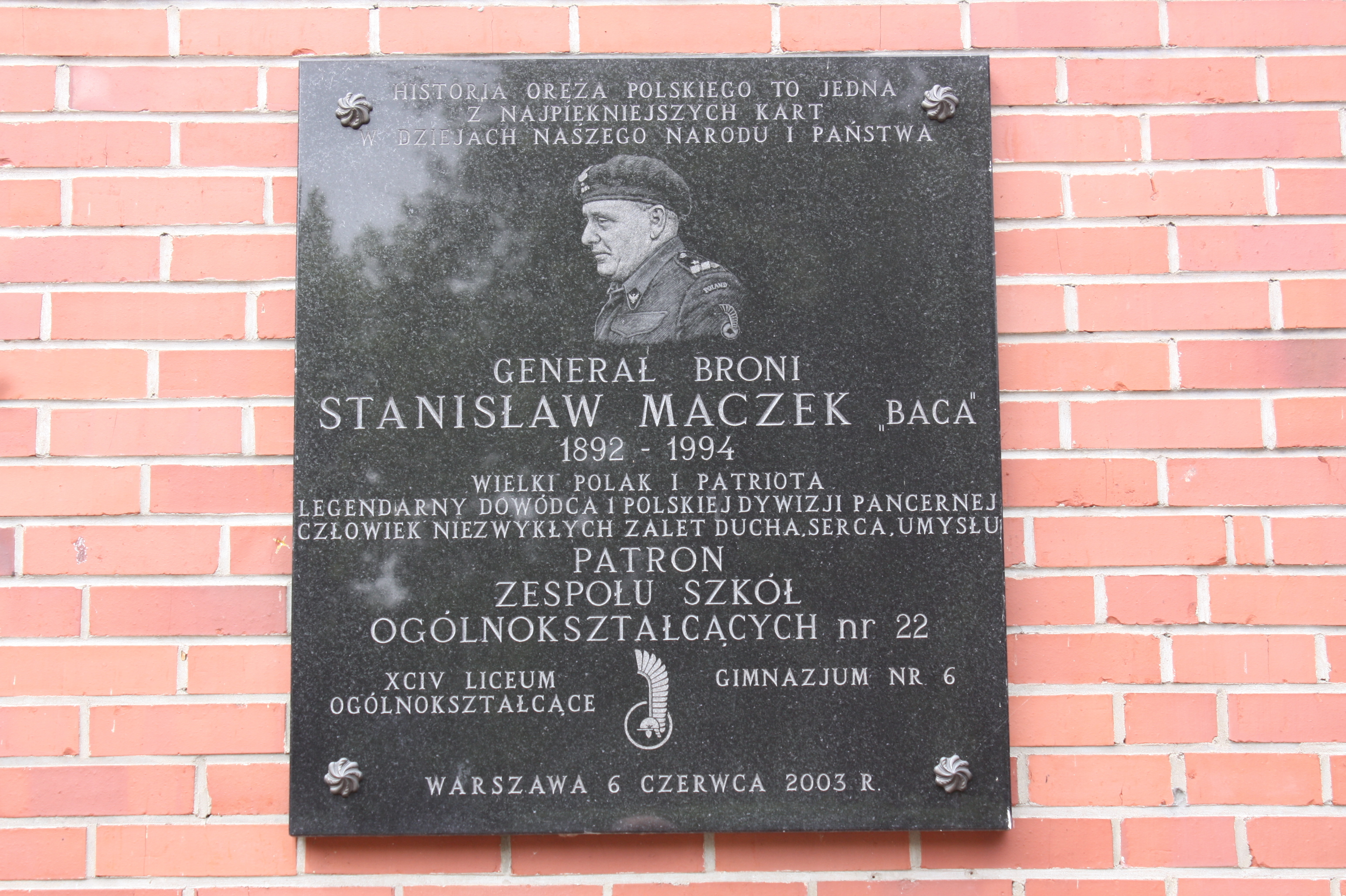 Tablica ku czci Generała Stanisława Maczka na budynku Zespołu Szkół nr 55 przy ul. Gwiaździstej 35 w Warszawie